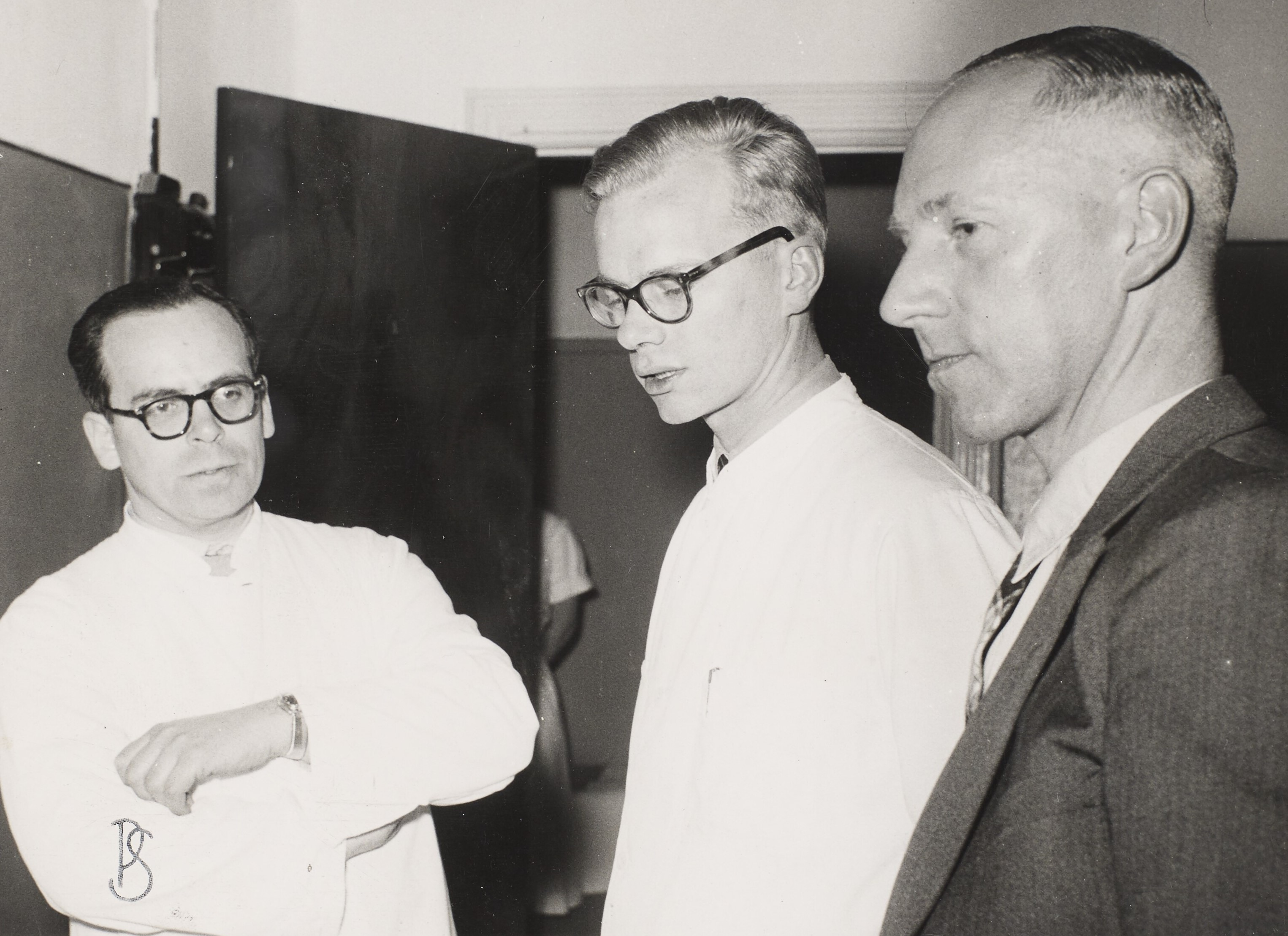 Lægerne Kell Jordal, Stig Jarnum og Olaf Halvorsen under den såkaldte Klaksvigsag, hvor fyringen af Halvorsen på grund af hans fortid i nazistiske SS førte til uroligheder.